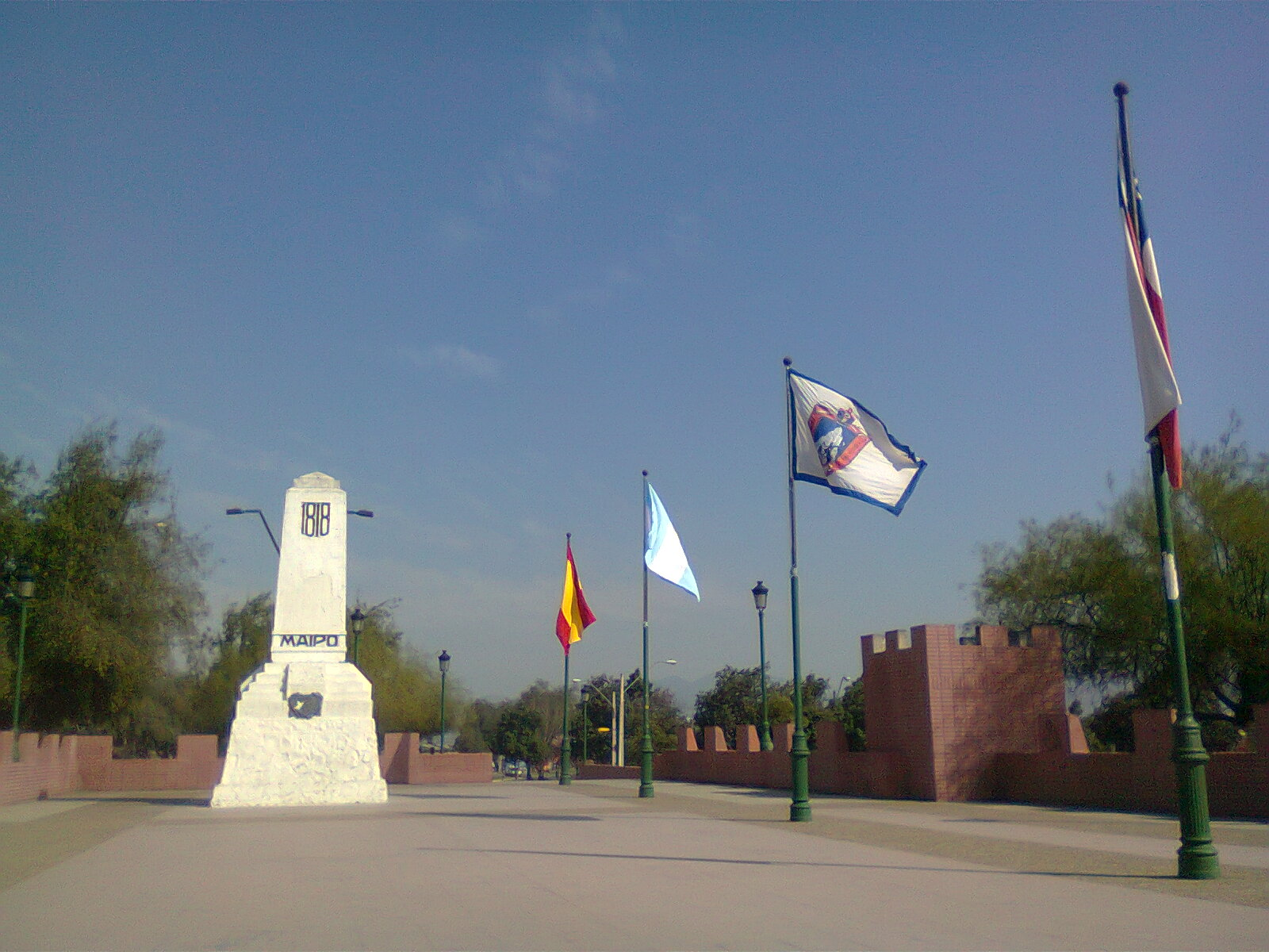 El Monumento al Abrazo de Maipú, ubicado en la esquina de Av. Olimpo y Av. Camino a Rinconada, en la comuna de Maipú. Fue construído en 1968 para homenajear al general español, José Ordóñez, y a todo el ejército vencido, cuyas tropas habían vencido en varios combates, como el Regimiento Burgos de España y otros que reforzaron a las tropas avecindadas en Chile. A sus costados tiene dos placas con el siguiente texto: «Desde estos alrededores se inició el último ataque patriota contra las fuerzas realistas que se defendían en las casa de Lo Espejo, el que dio como resultado la victoria de Maipo». «En los alrededores de este monumento se efectuó el abrazo entre los generales O'Higgins y San Martín al finalizar la Batalla de Maipo el 5 de abril de 1818».